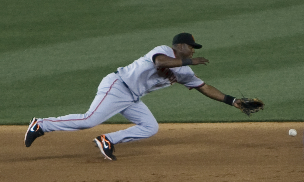 Edgar Rentería